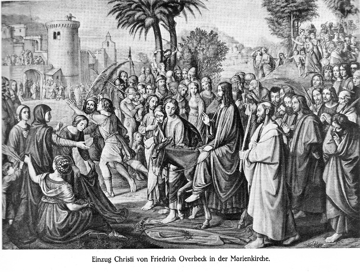 Der Einzug Jesu in Jerusalem aus dem Jahr 1824 galt als eines der Hauptwerke Friedrich Overbecks. Das Bild befand sich in der Lübecker Marienkirche und verbrannte dort 1942 beim Luftangriff auf Lübeck.